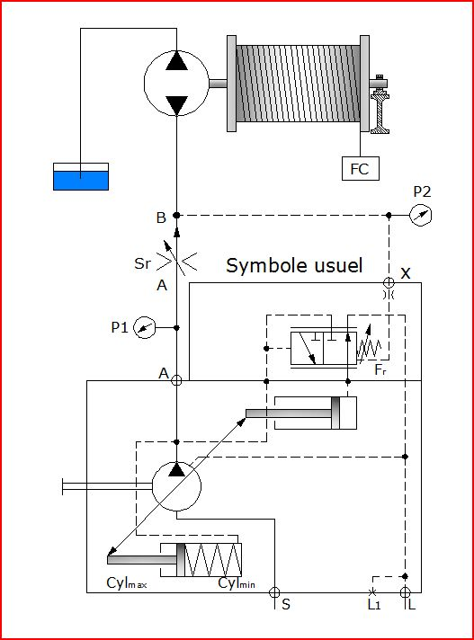 circuit L-S 1 actionneur